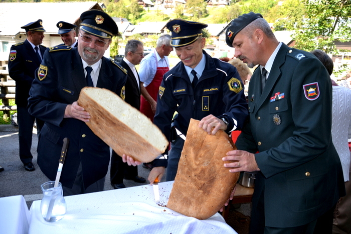 10. sveta maša za policiste Srednja vas v Bohinju 2014 . (iz leve proti desni) Janez Novak župnik in policijski vikar, Robert Mencin komandir policijske postaje Bled, Jože Plut vojaški vikar, polkovnik. Kruh za pogostitev je pripravila in spekla Milena Rozman iz Jereke.